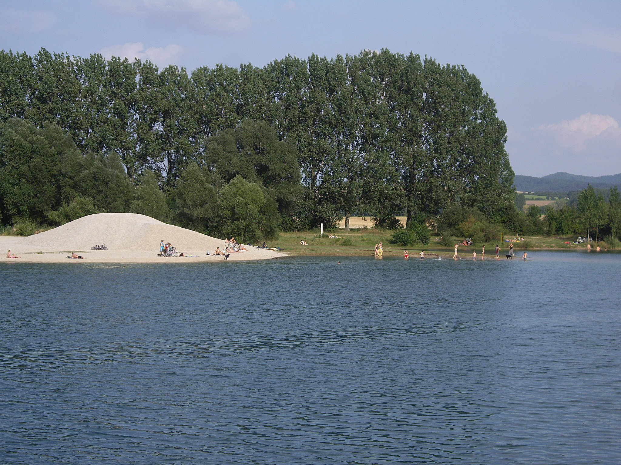 Rosdorfer Baggersee bei Göttingen, Blick nach Osten auf Badegäste und mehrere badende Hunde, 8.8.2014. Foto: F. Welter-Schultes.